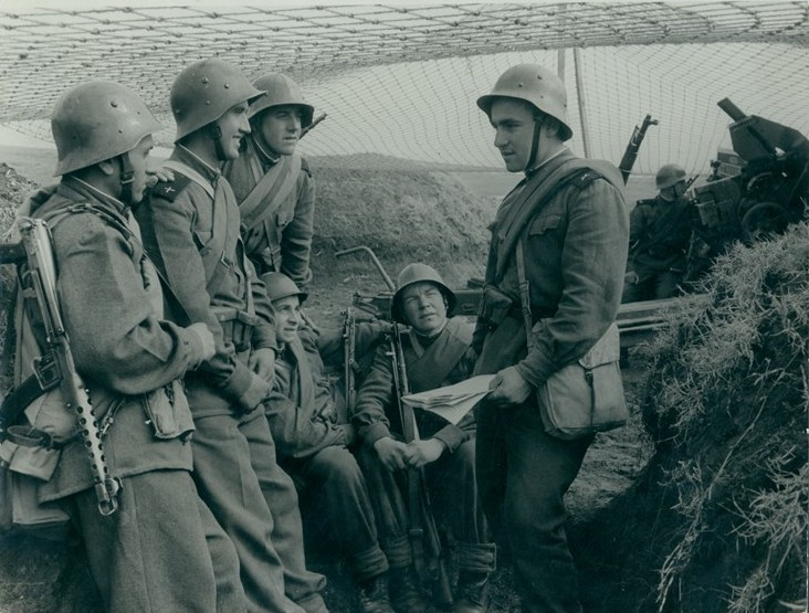 Учение на Шести артилерийски полк.